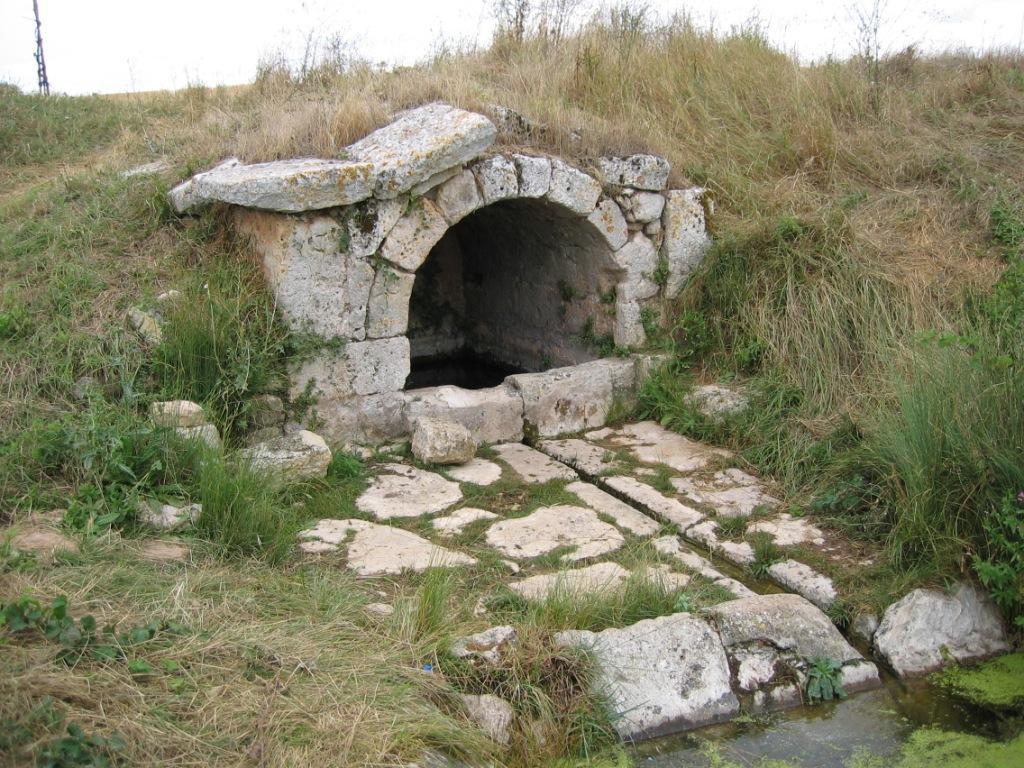 Fuente Villamoron (Burgos, Castilla y León)